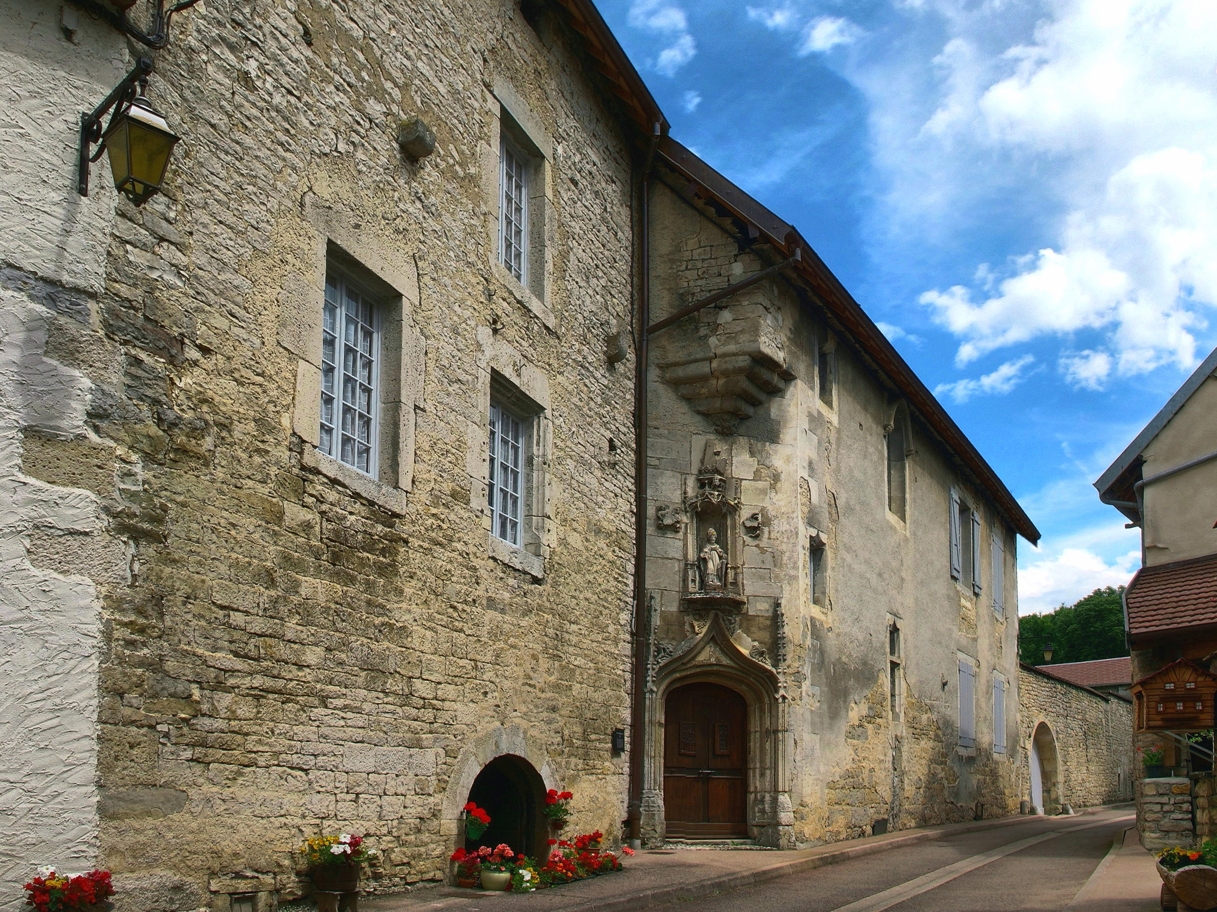 Inscrit aux monuments historiques ous le numéro : PA00101740